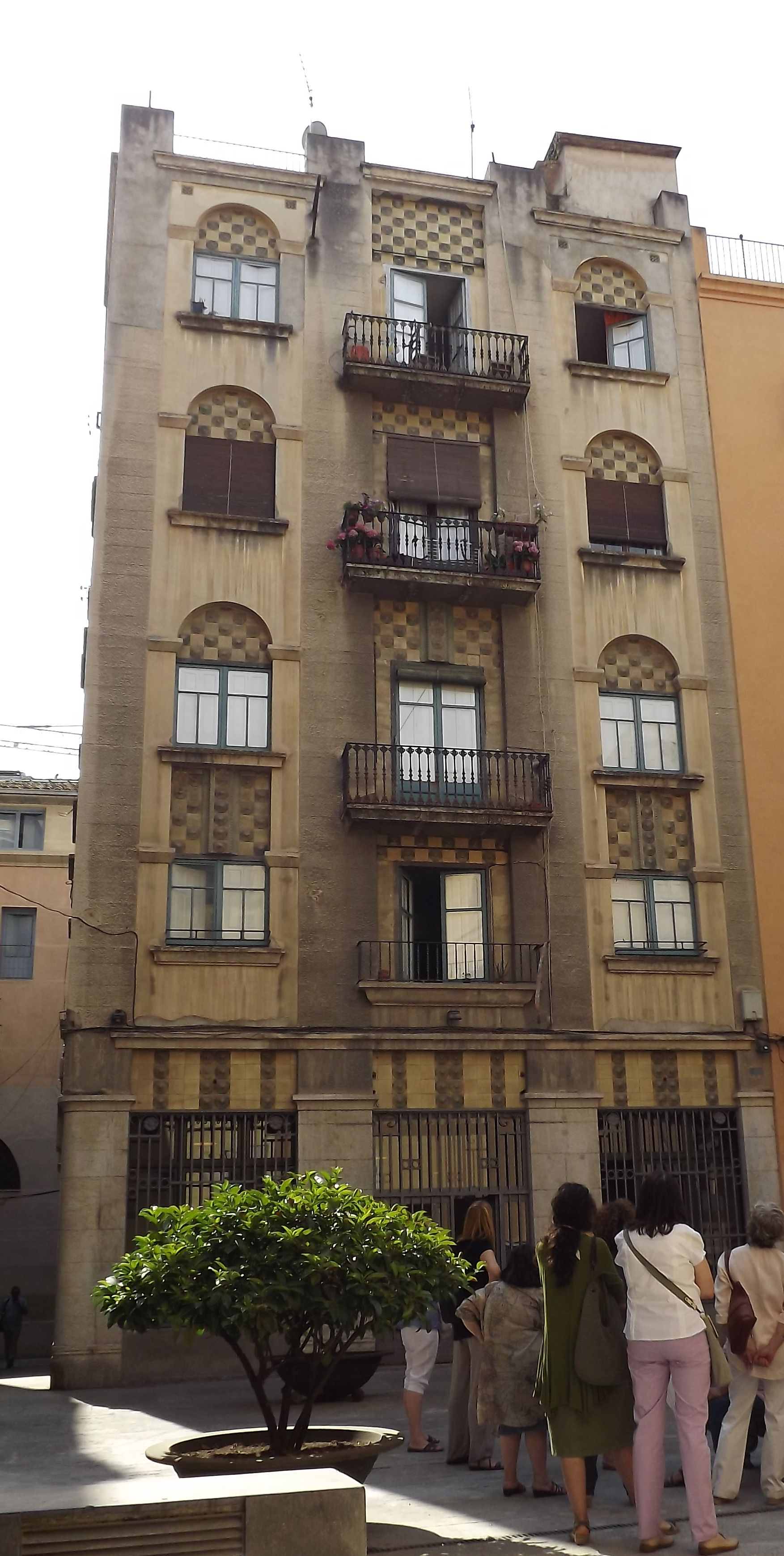 Bloc d'habitatges